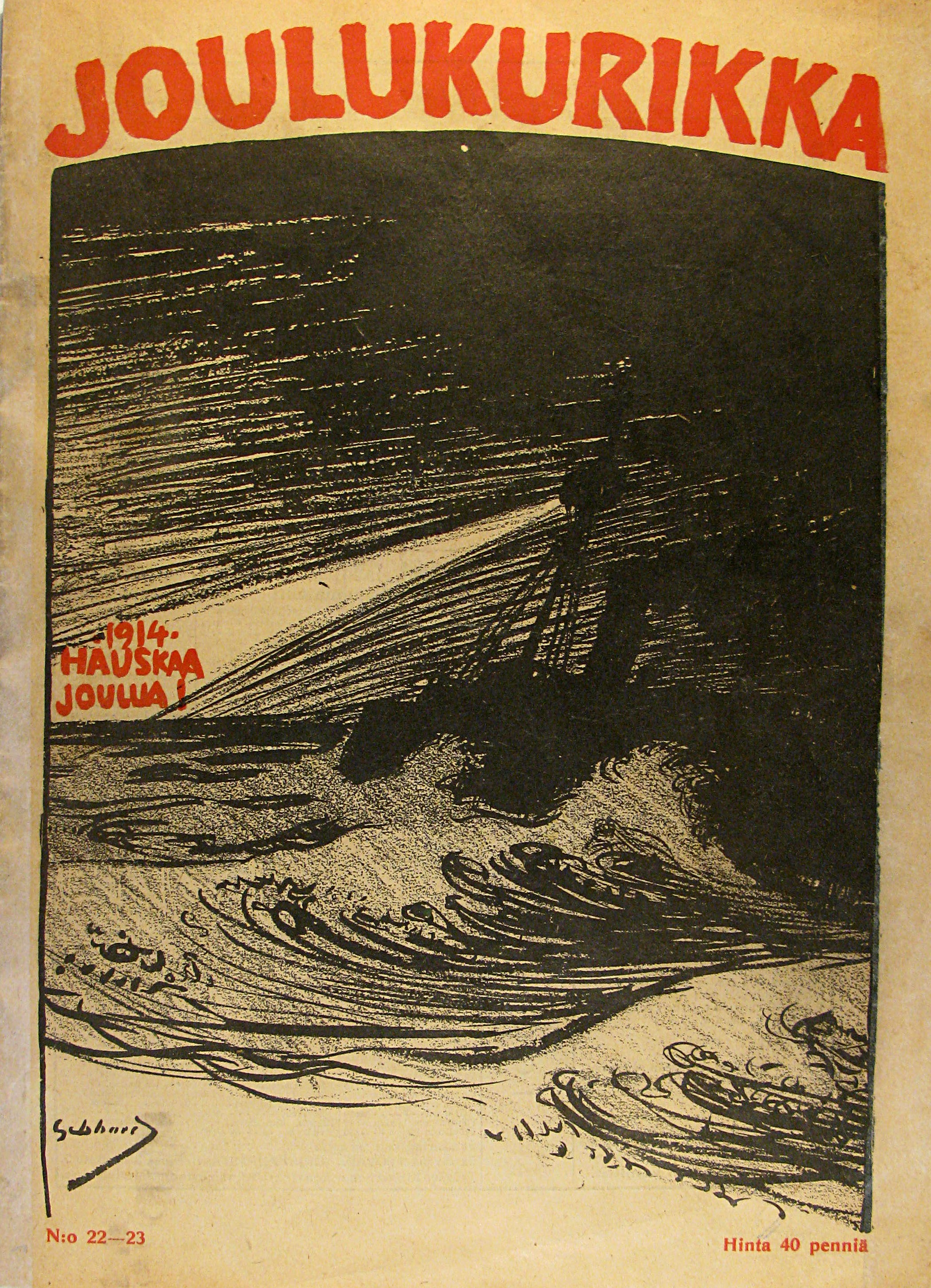 Pilalehti Kurikan joulunumero 1914:22/23